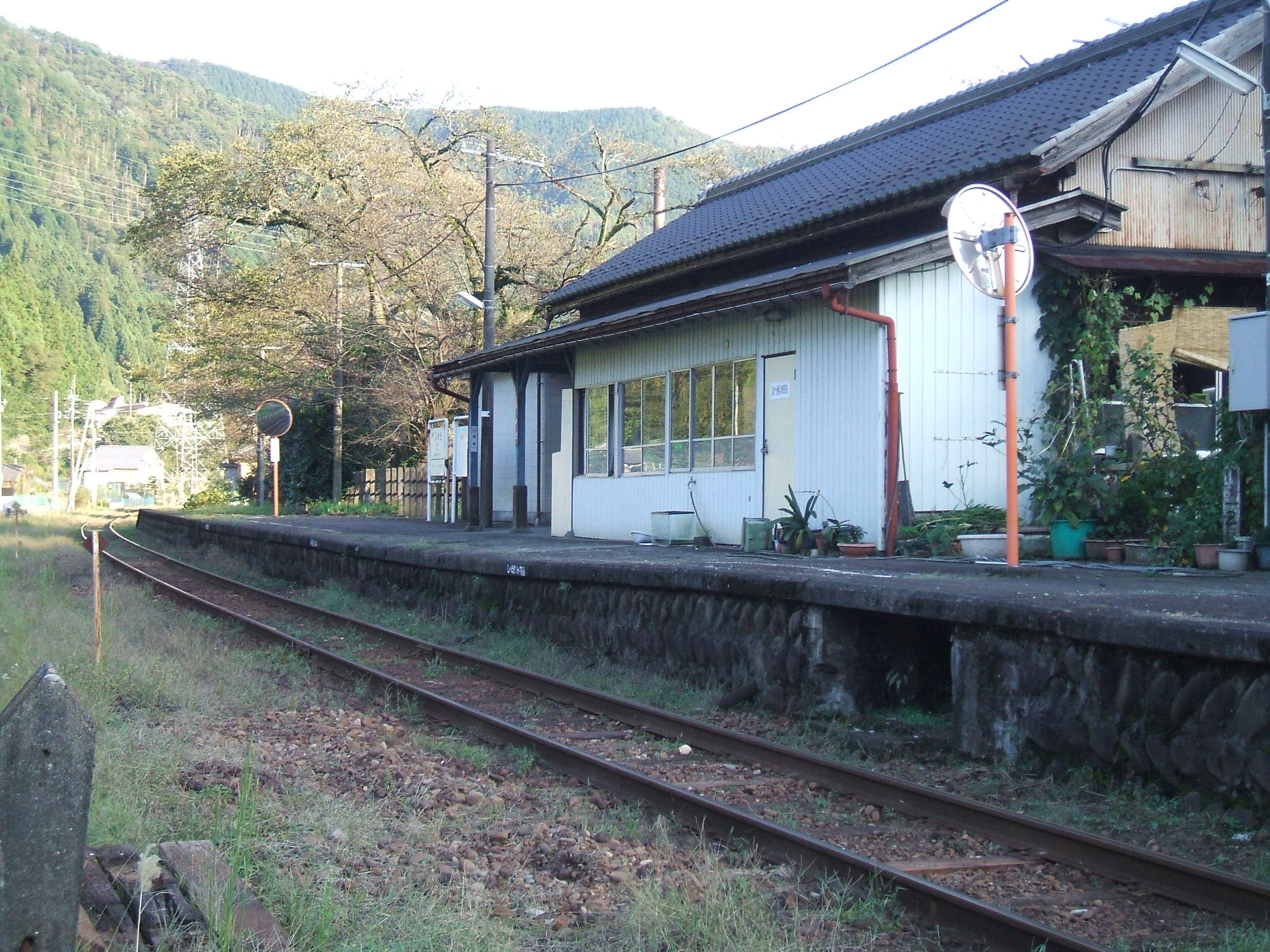 駅の様子。